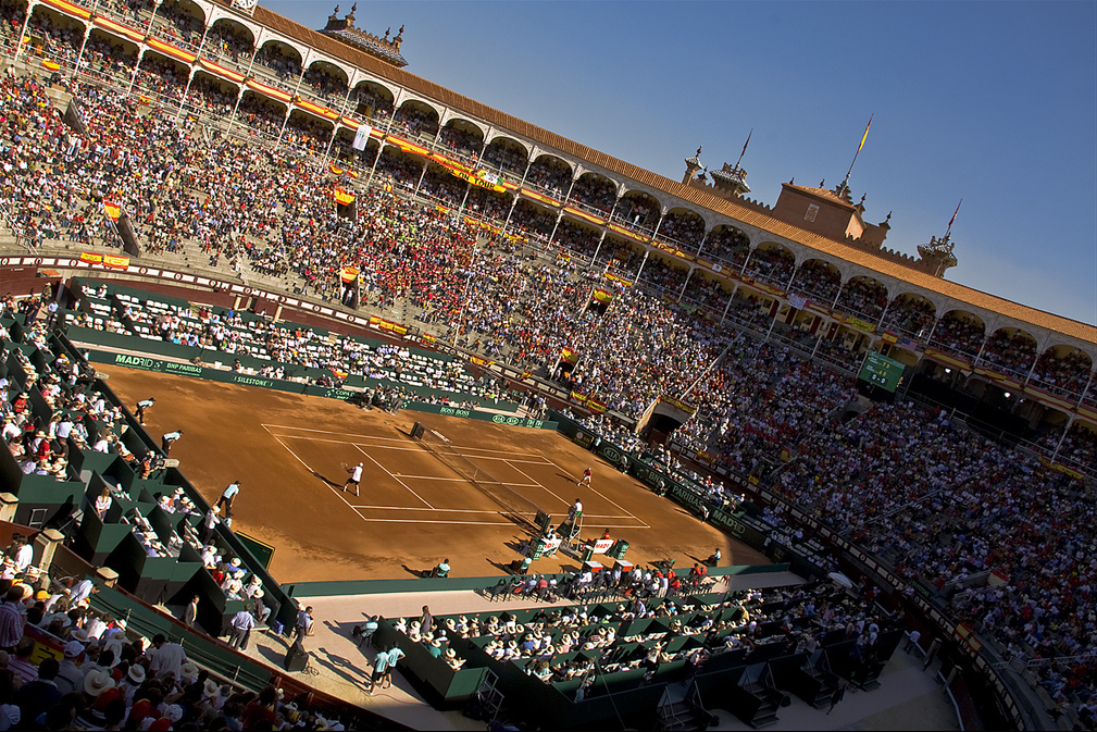 David Ferrer (winner) Vs Andy Roddick. Semifinal Copa Davis 2008. Plaza de Toros de Las Ventas. Madrid.